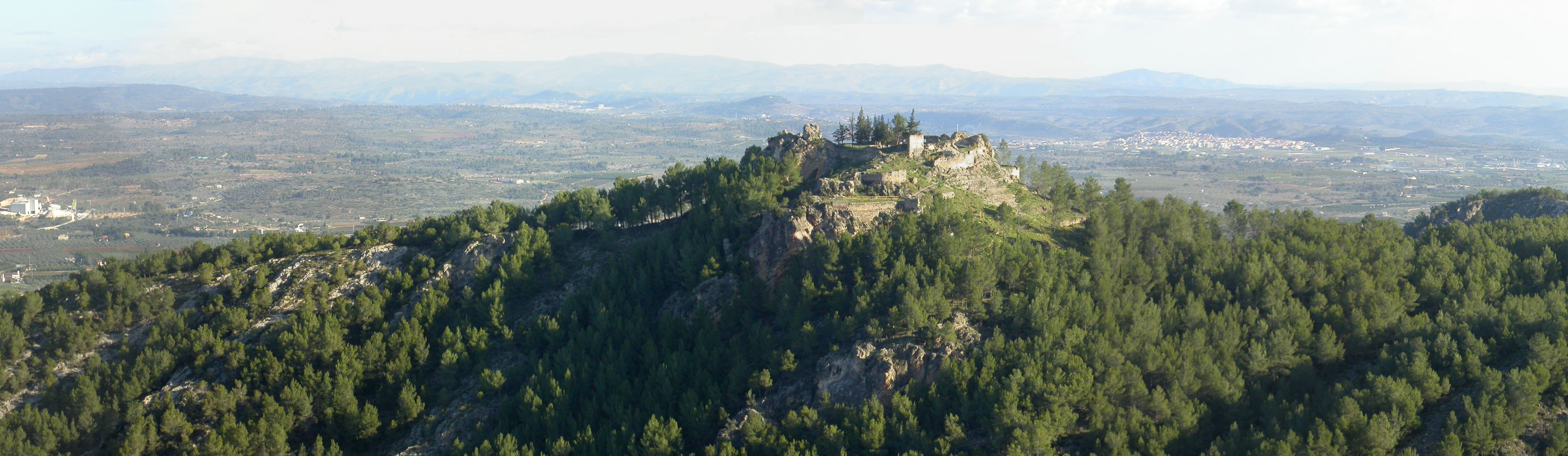 Vista del Castillo de Enguera desde el suroeste, al fondo se ven algunos de los pueblos de La Canal.